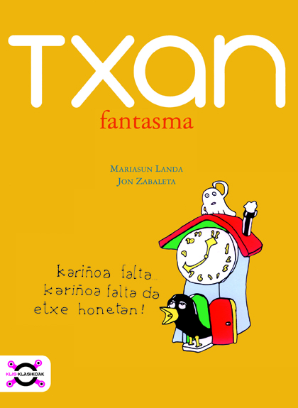 Txan fantasma